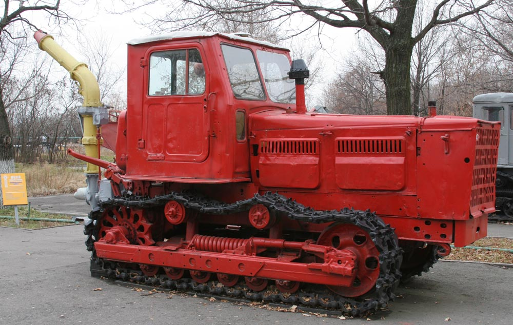 Трактор Т-4А в Саратове на Соколовой горе